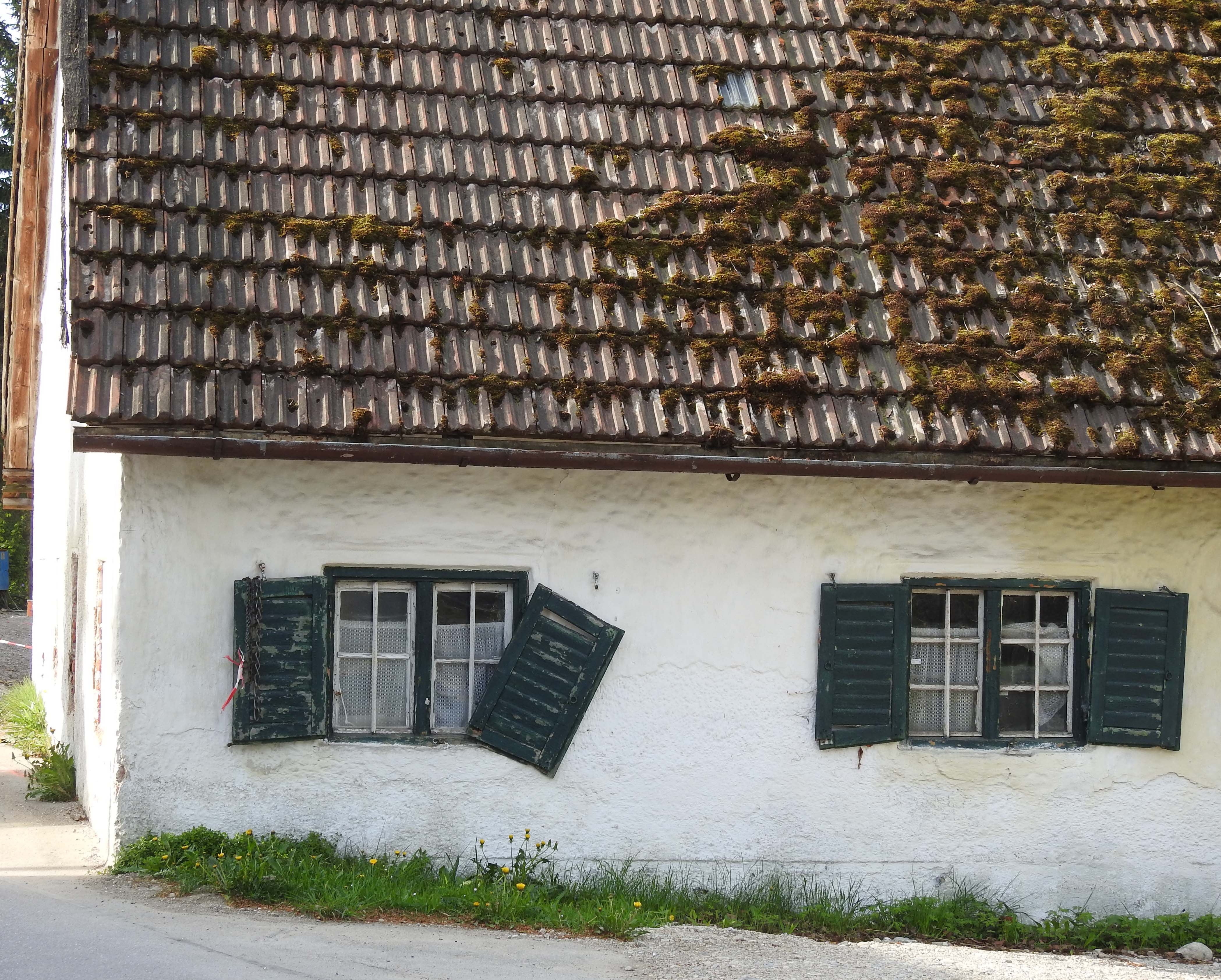 Am Urtel 2 in Gelting, Pliening